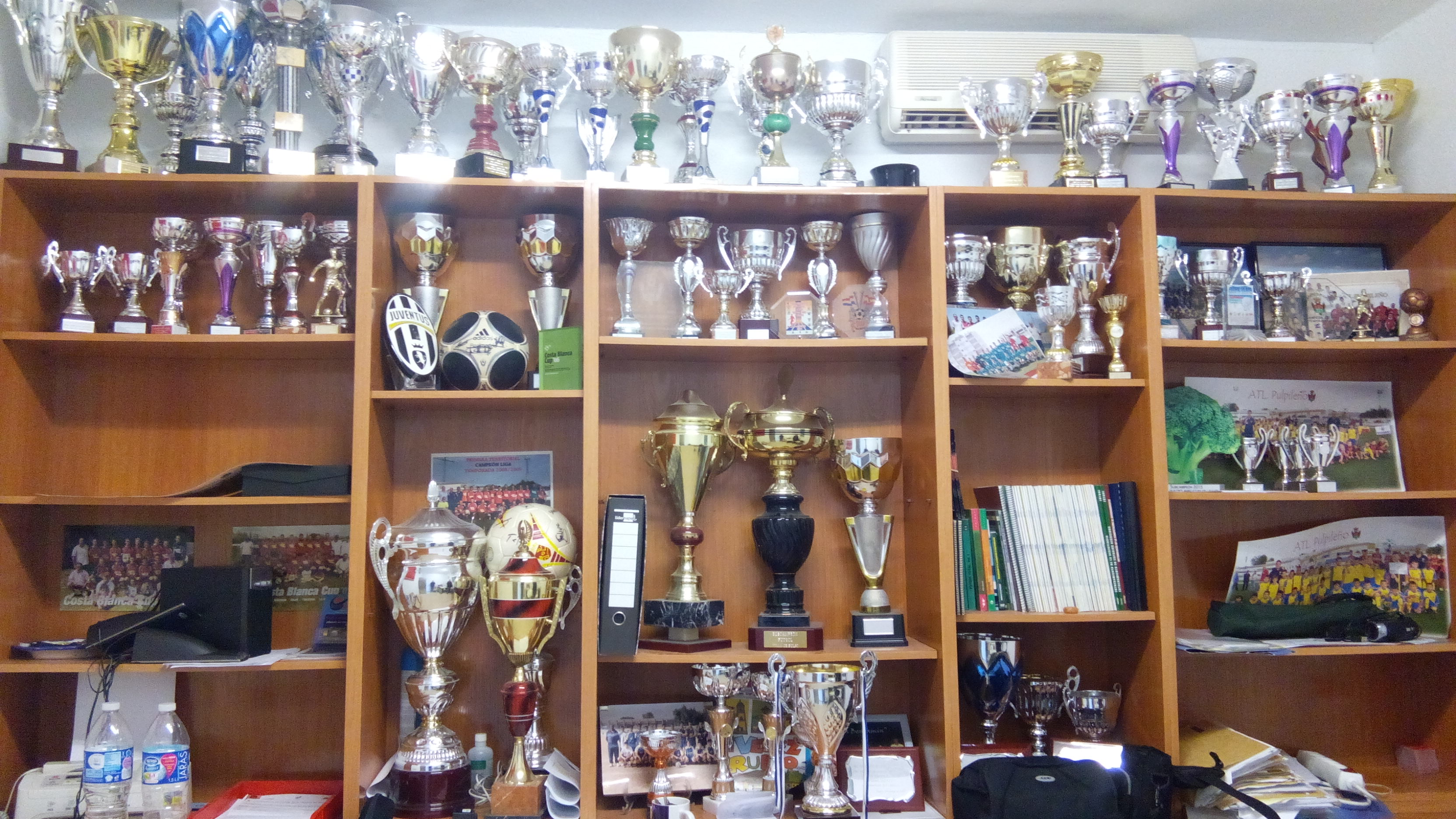 Todos los titulos que el Atlético Pulpileño ha ganado en sus últimas temporadas entre todas las categorías.